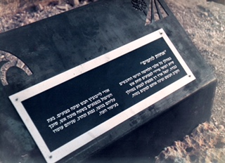 שלט הדרכה עם שמו של אורי לבוביץ באתר גבעת התחמושת